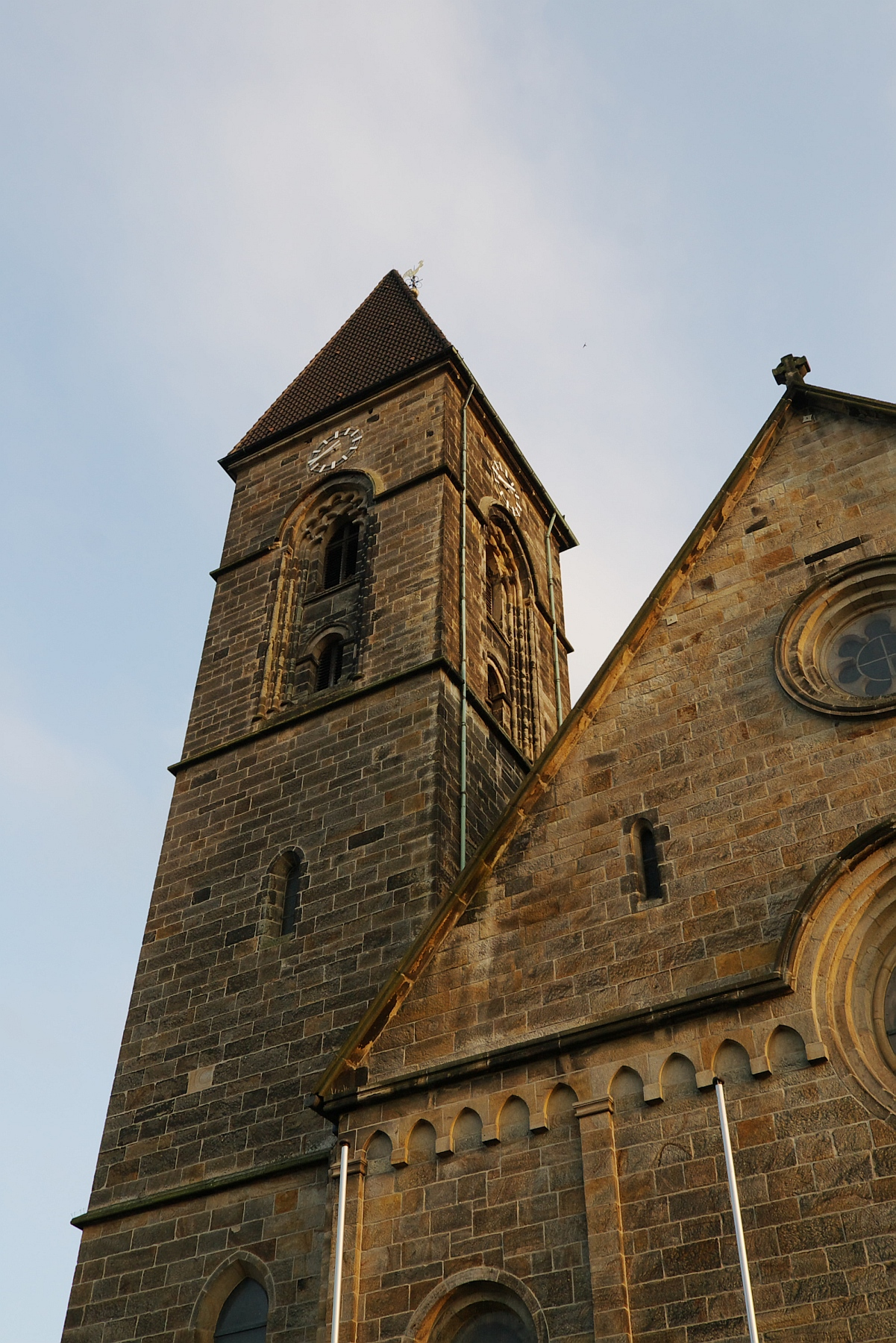 St. Stephanus in Hamm Bockum-Hövel